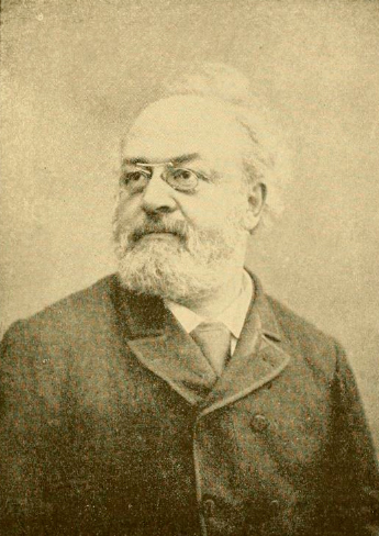 Porträt von Otto Singer (* 26. Juli 1833 in Sora, heute zu Wilthen; † 3. Januar 1894 in New York City).